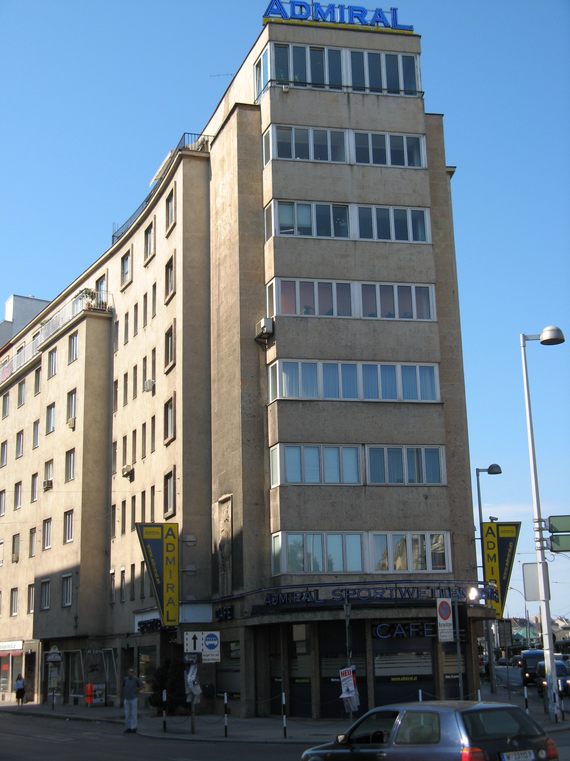 Wohnhaus Bärenmühle (1937-38) von Hermann Aichinger und Heinrich Schmid in der Operngasse in Wien